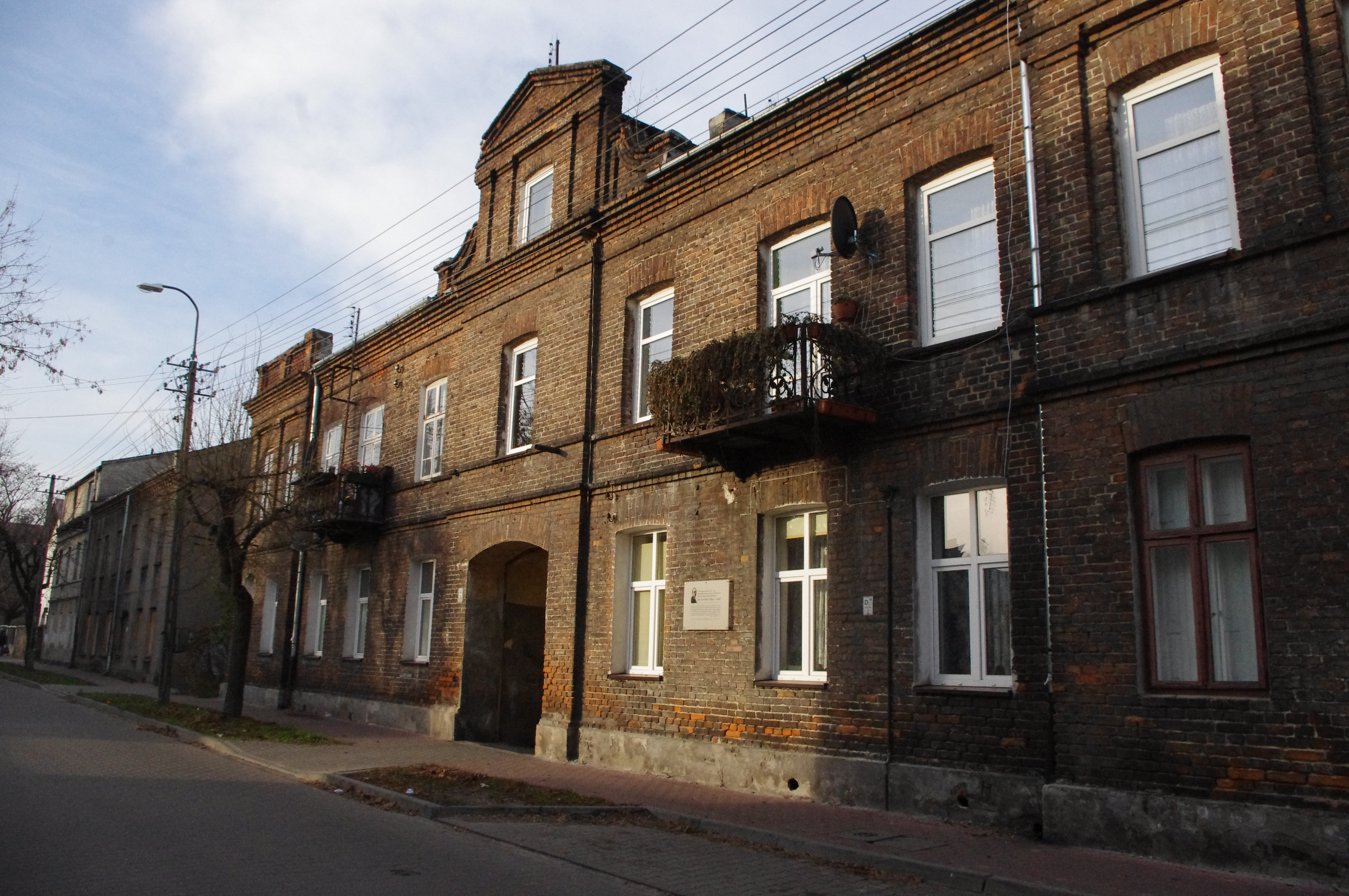 Kamienica przy ul. Ołówkowej 14 w Pruszkowie, gdzie w latach 1911-1912 mieszkał poeta Jan Lechoń